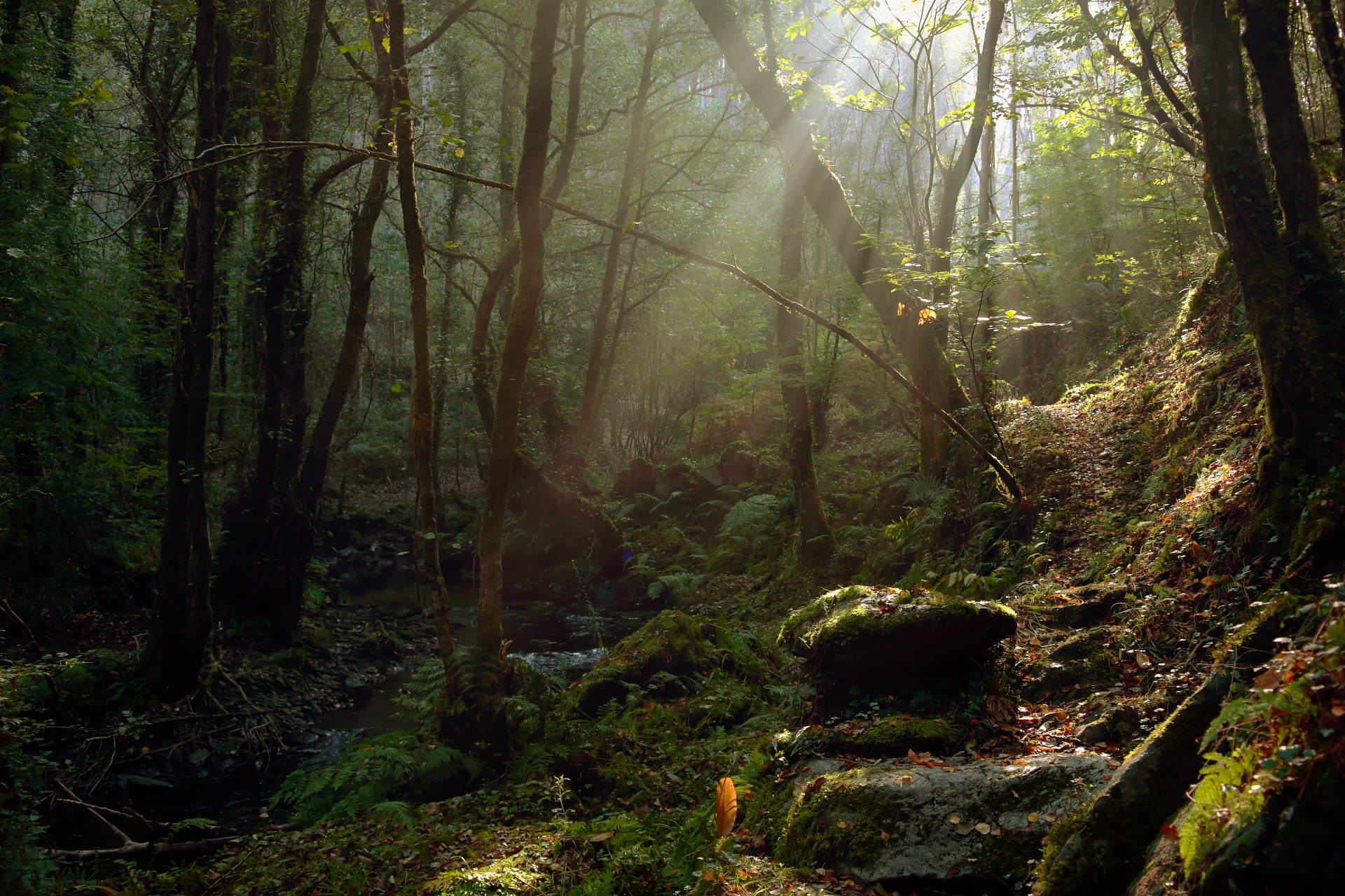 Betanzos - Mandeo This is a photography of a Site of Community Importance in Spain with the ID: ES1110007. Natura2000 entry, EEA entry